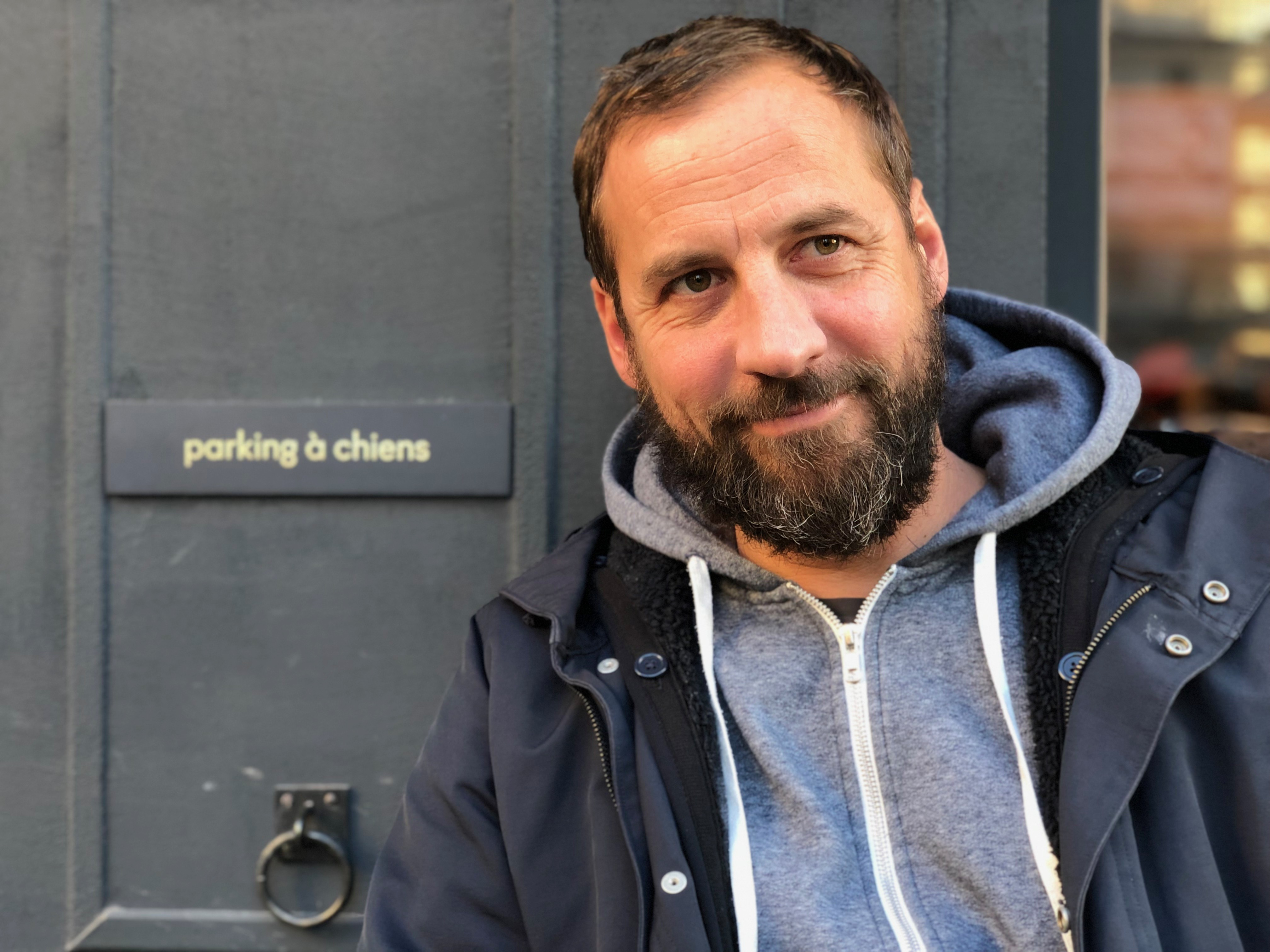 photo pour repérage tournage série française